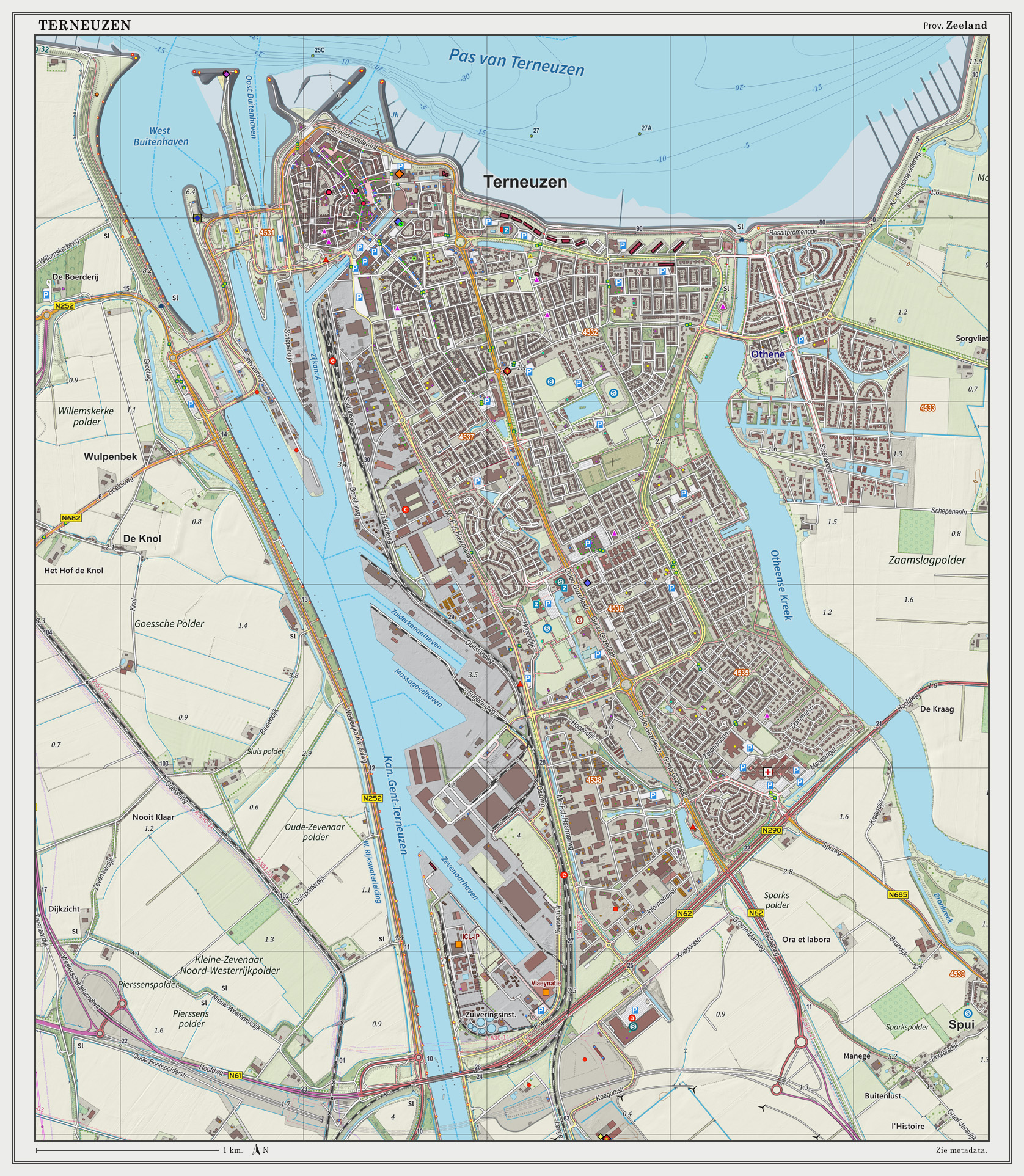 Topografische kaart van Terneuzen (woonplaats). Resolutie: 300 pixels/km. Kaartbeeld samengesteld uit de open geodata van de Top10NL en Top25namen (Basisregistratie Topografie, Kadaster), Creative Commons BY licentie. Gebouwvlakken uit open geodata BAG extract. Wegen uit de OpenStreetMap. Reliëfschaduw uit de Actuele Hoogtekaart AHN2. Samenstelling en kleurenschema: Jan-Willem van Aalst, met QGIS2. Zie ook de Legenda.